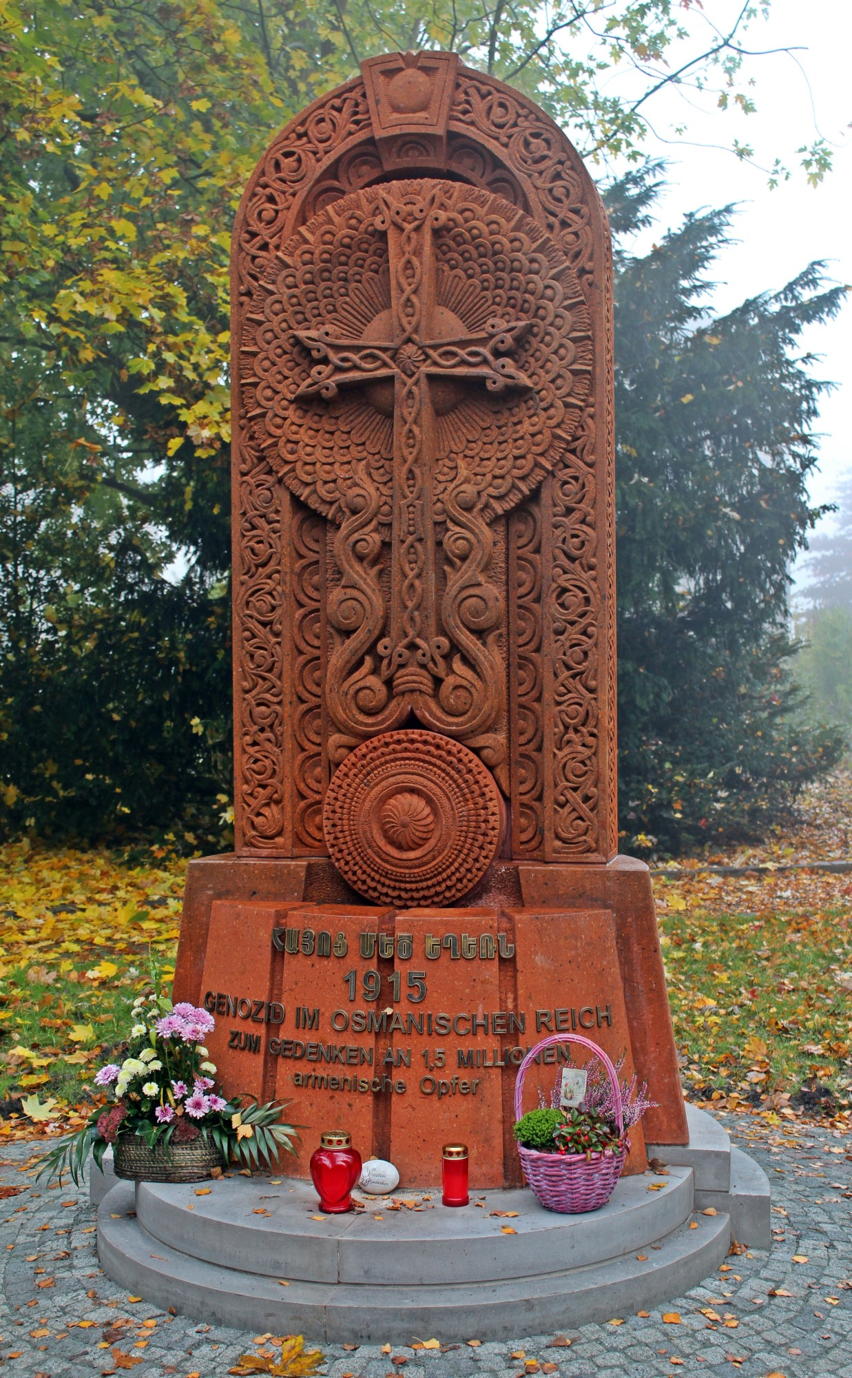 Khatchkar im Inselgarten der Nesse in Leer/Ostfriesland - Vorderansicht.